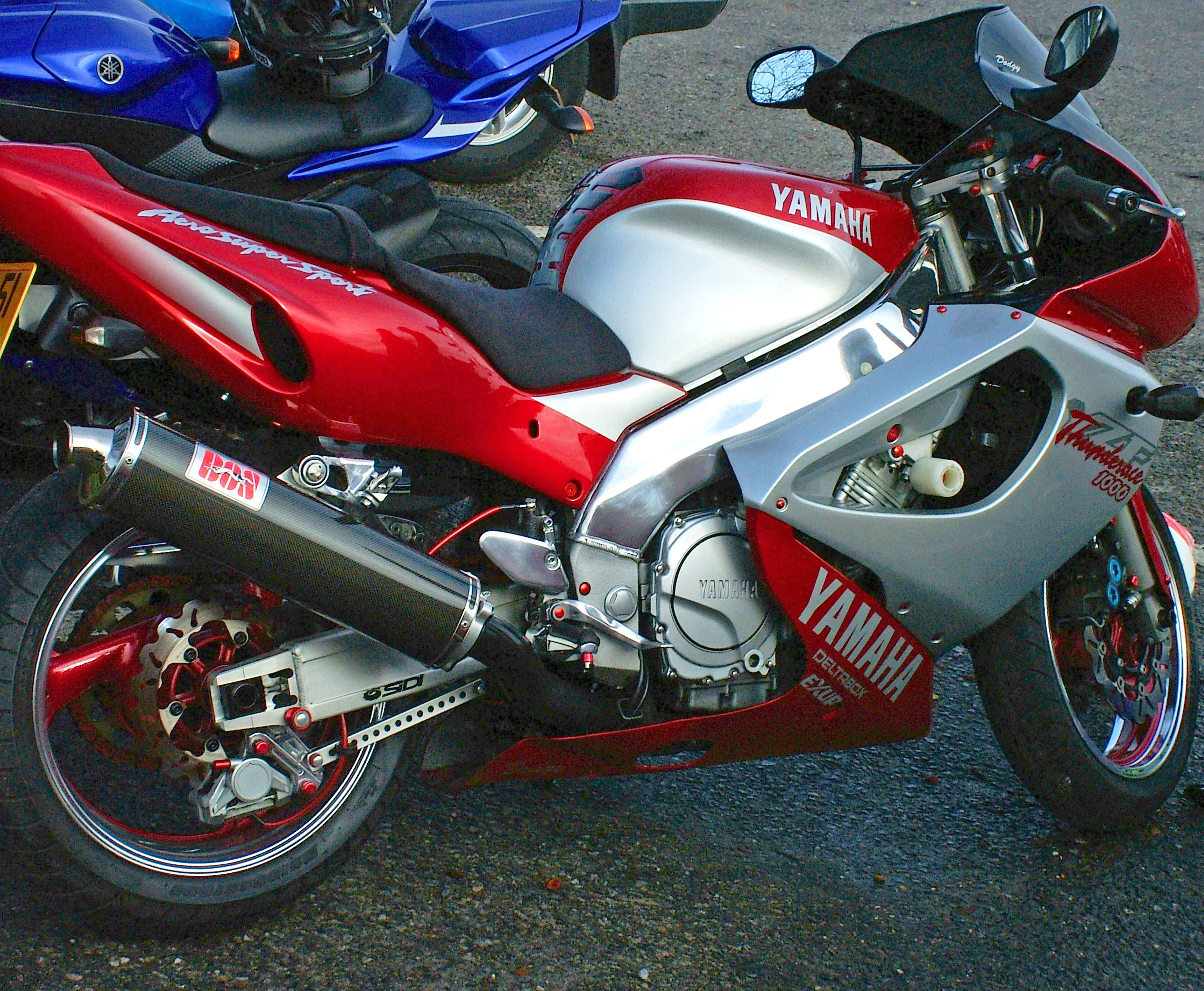 Yamaha YZF1000R Thunderace